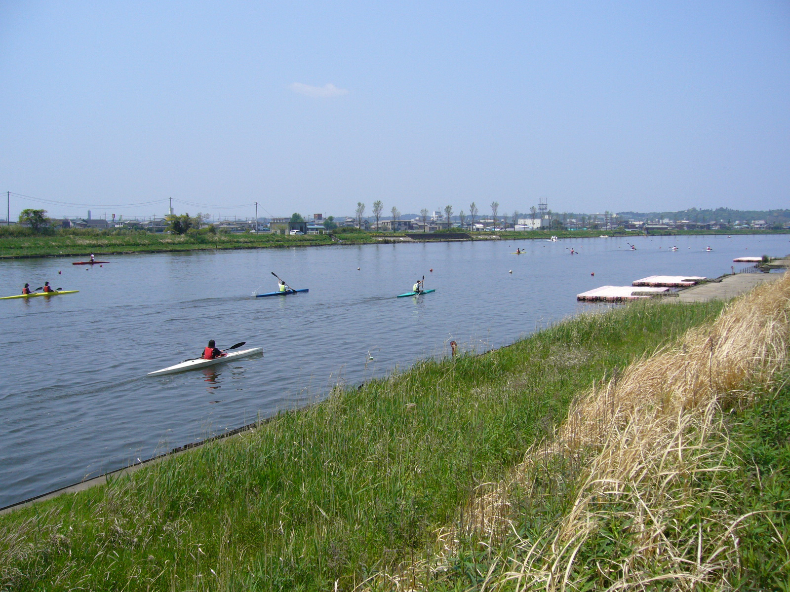 kurobe river(chiba),katori-city,japan